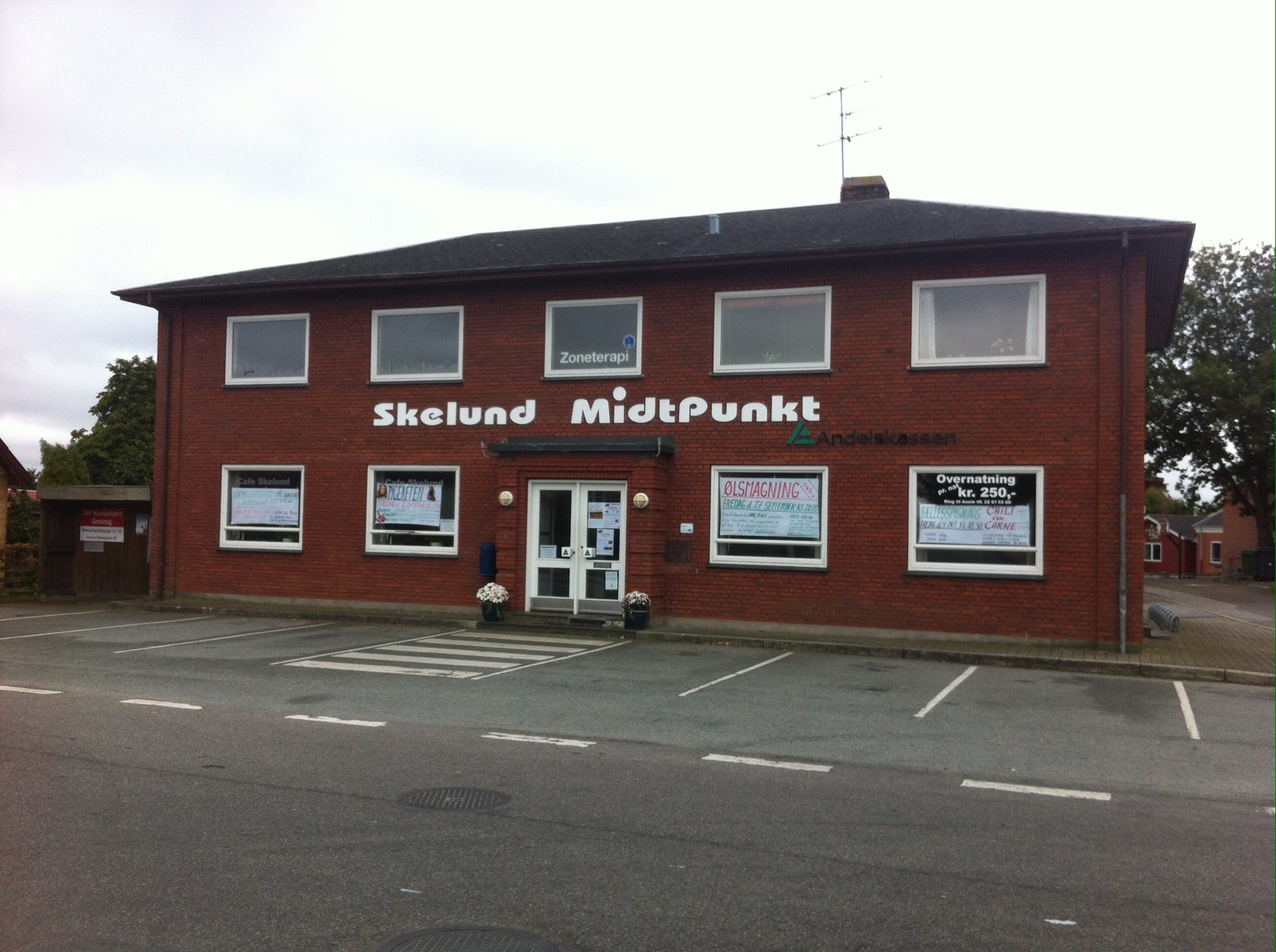 Skelund Midtpunkt på Skelund Hovedgade, 9560 Hadsund